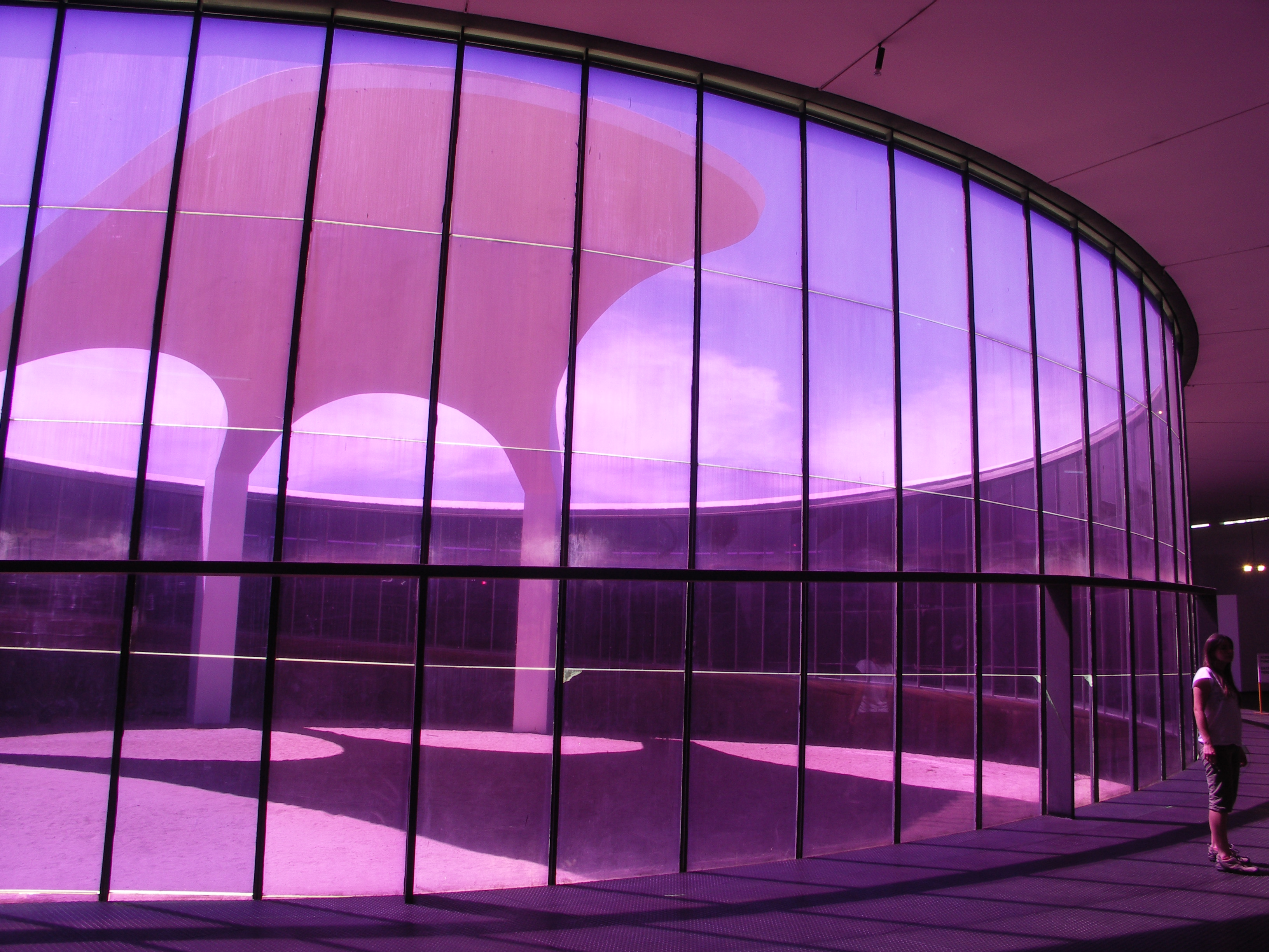 Vista interna do Memorial dos Povos Indígenas